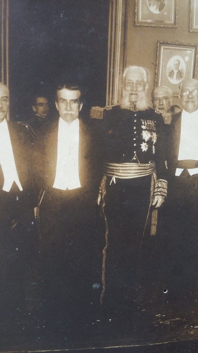 El presidente peruano Augusto B. Leguía junto a Andrés Avelino Cáceres